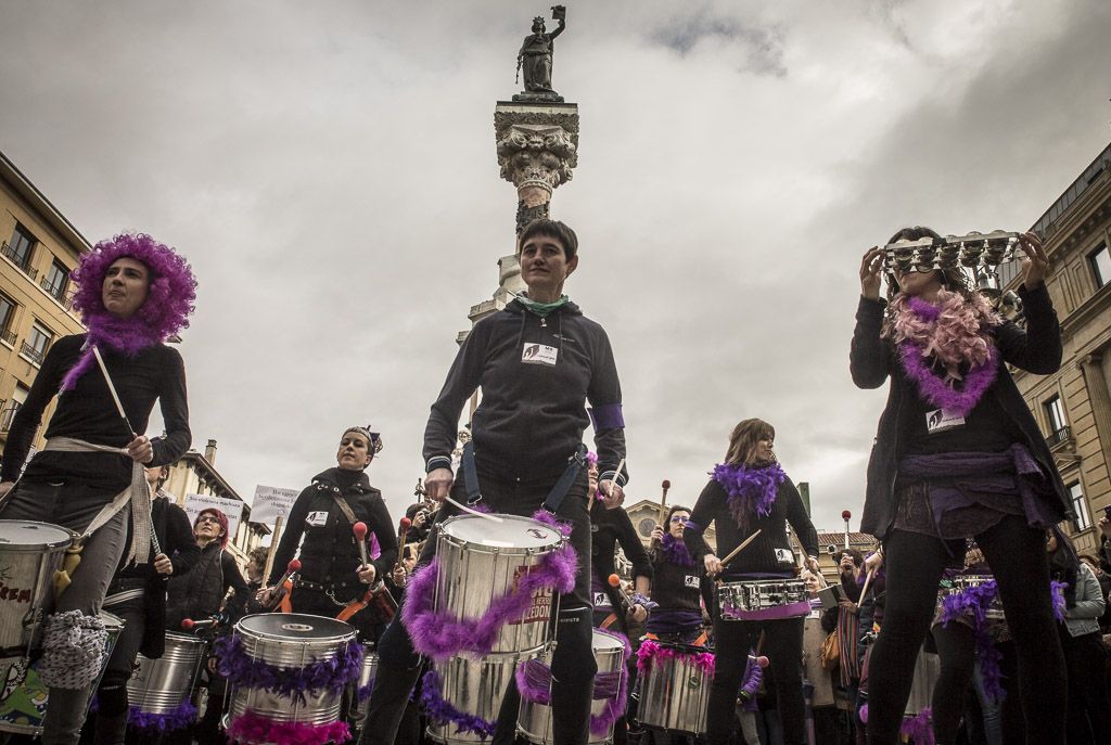 2018ko martxoaren 8ko greba feminista Iruñean. Goizeko irudi bilduma Ekinklikek egina.